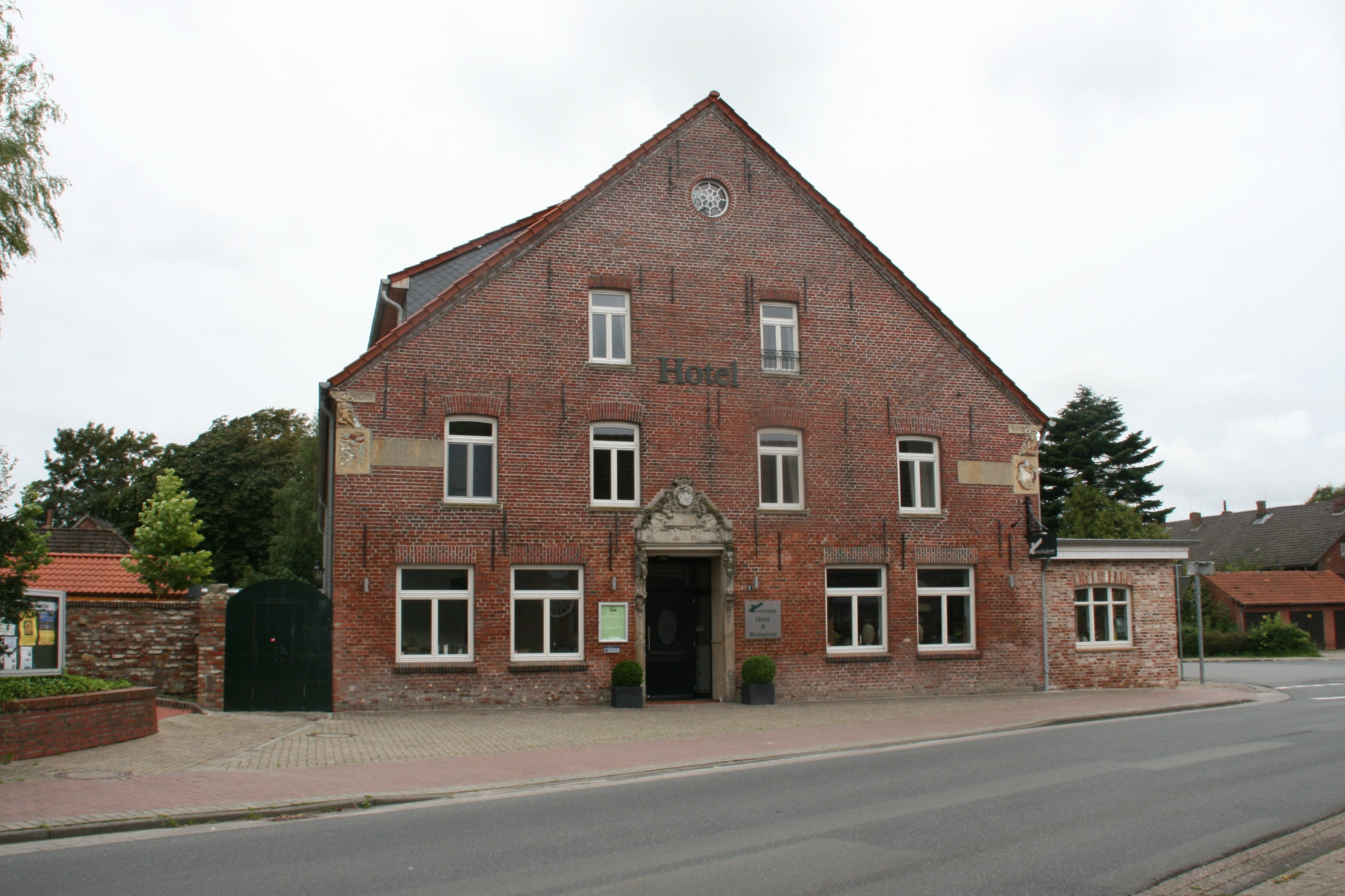 Gebäude Hotel To`nschlagboom in Waddewarden mit historischen Eingangsportal